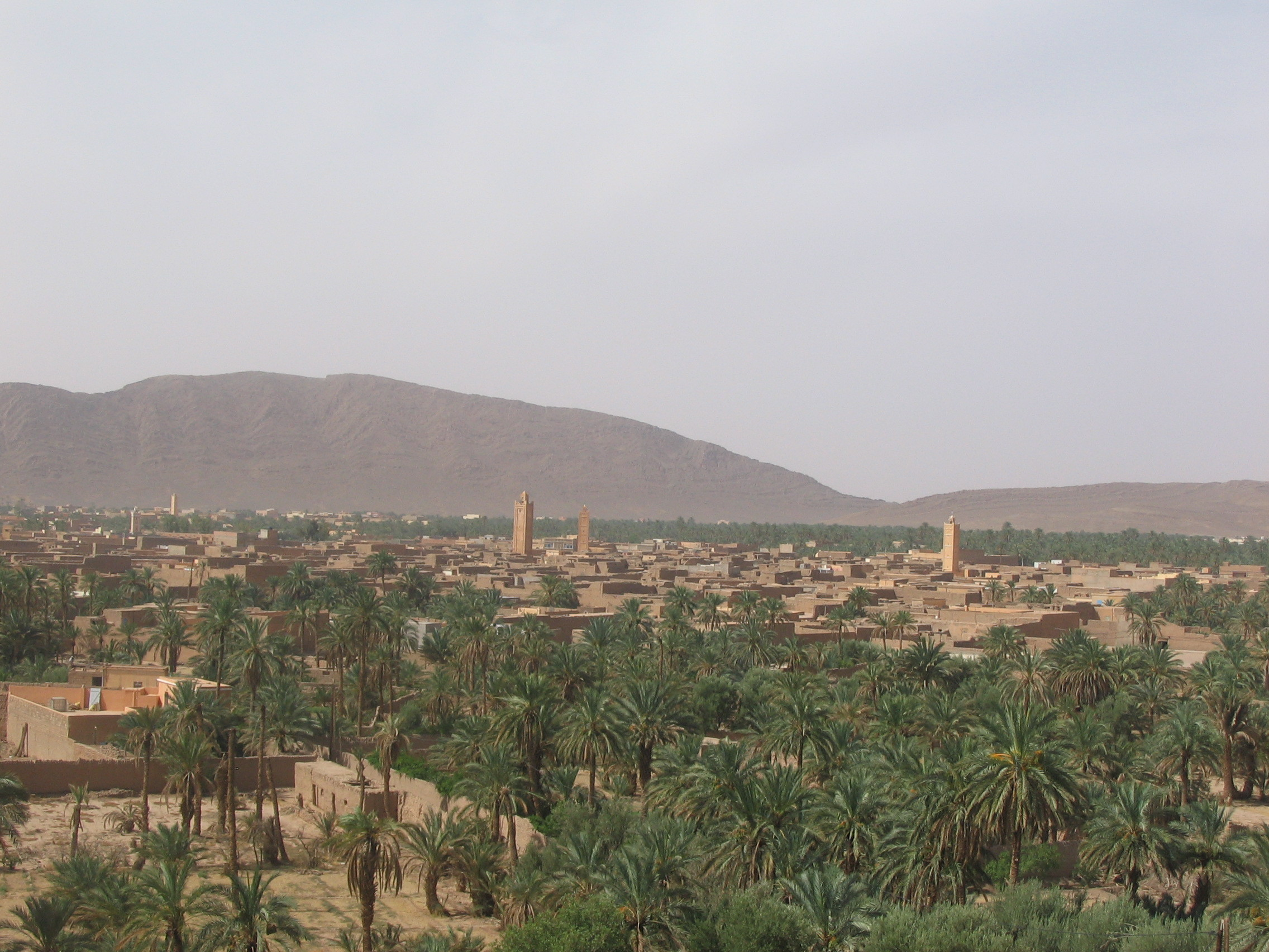 Figuig, Maroc